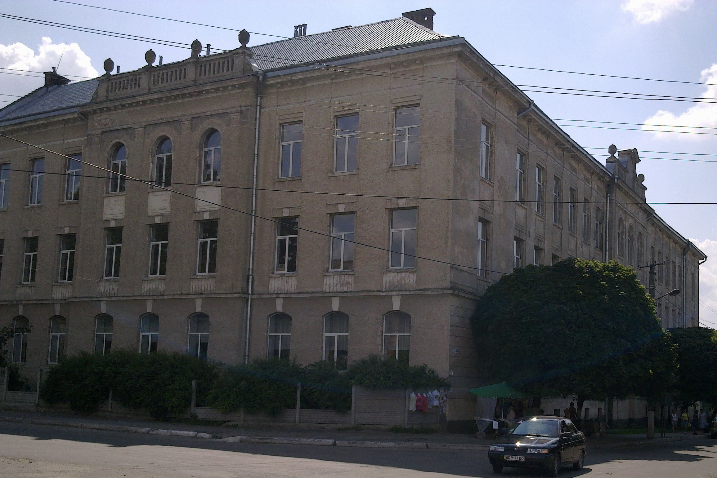 Будівля Сокальської вчительської семінарії, вул. Тартаківська, 10